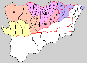 群馬県甘楽郡の町村。